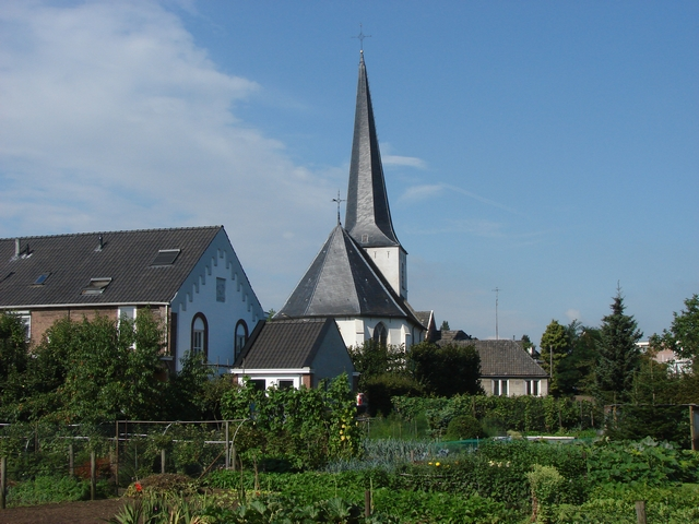 Johannesker Lichtenvoorde